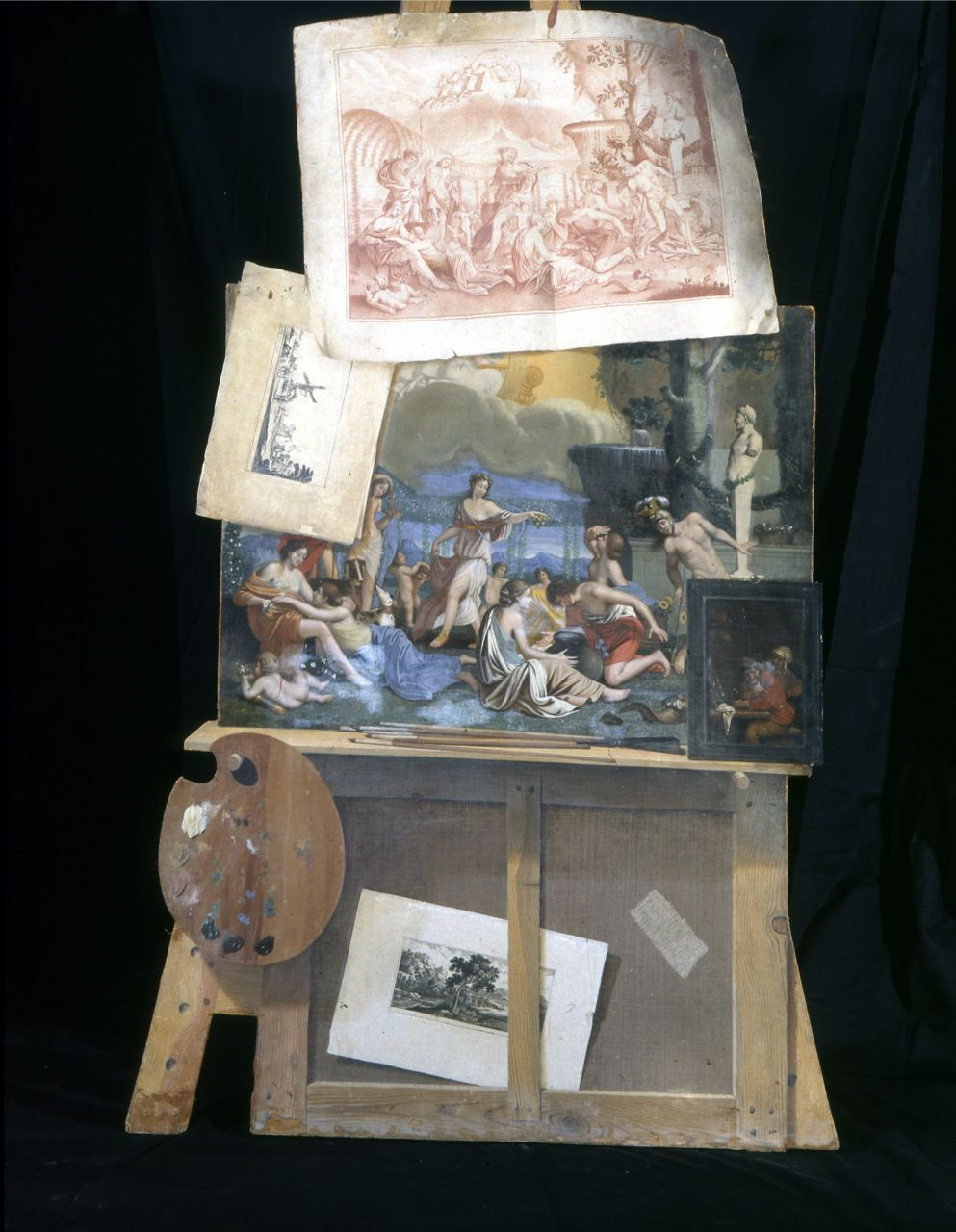 Antonio FORBERA (XVII век) или Jean-François de Le Motte (1625-1685)